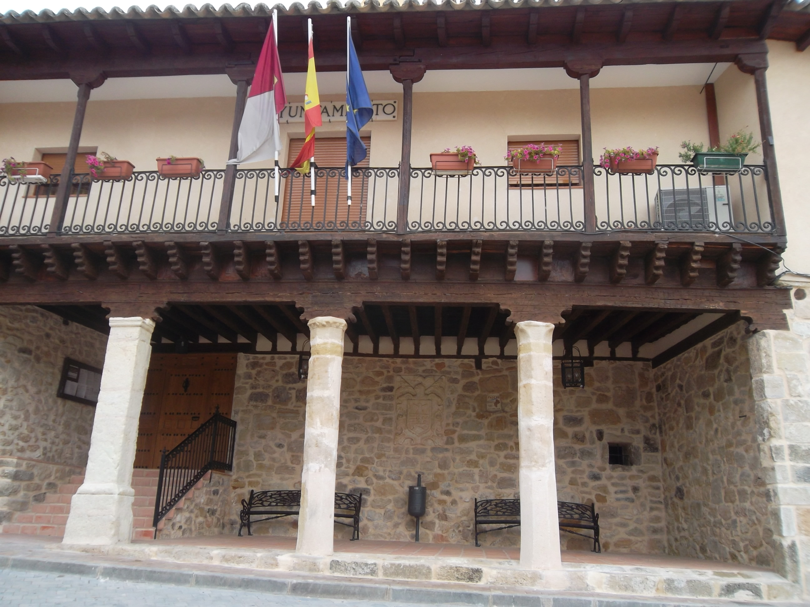 Auñón-Edificio del Ayuntamiento, en la Plaza Mayor